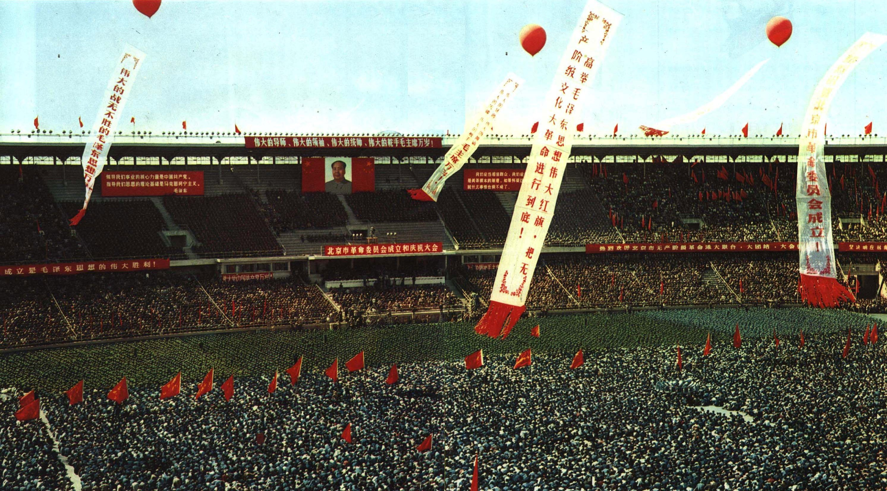 1967-07 1967年4月20日北京市革命委员会成立工人体育场